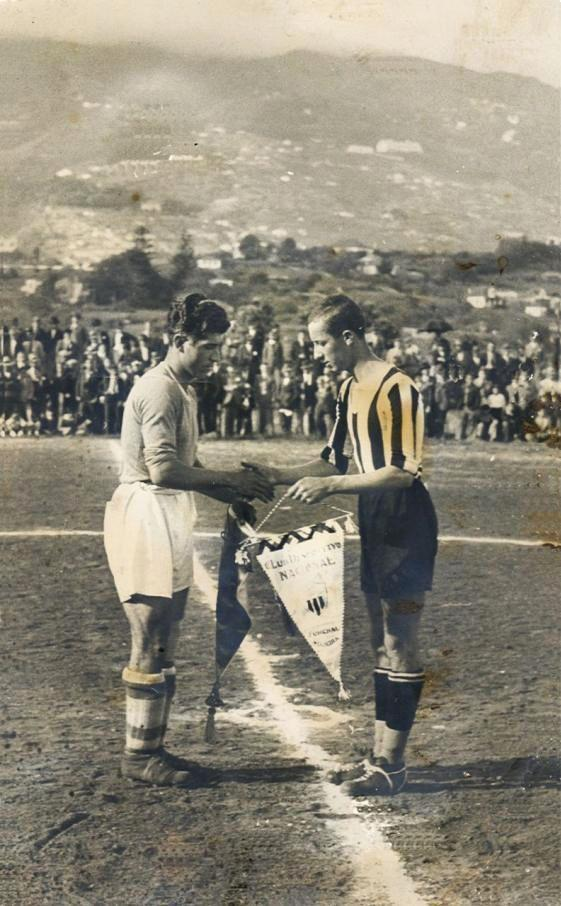 Capitães trocando galhardetes. Jogo de futebol entre o Clube Tenerife e o Clube Desportivo Nacional da Madeira. Antigo Campo dos Barreiros, 1925. Funchal, ilha da Madeira.